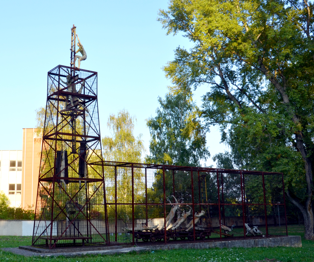 Jiří Sozanský, Memento mori, 1992, Litoměřické krematorium